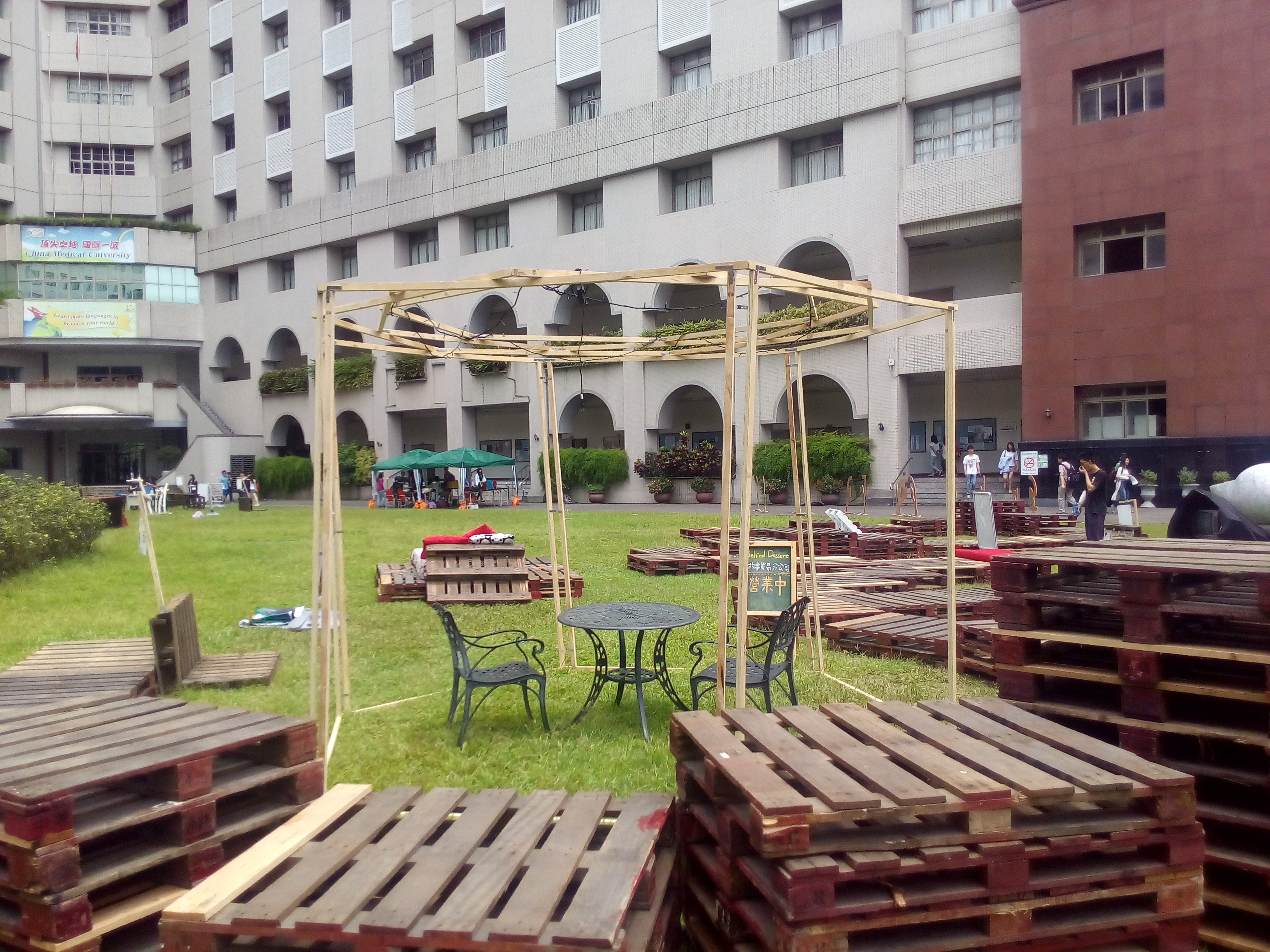 CMU Taichung Campus meadow